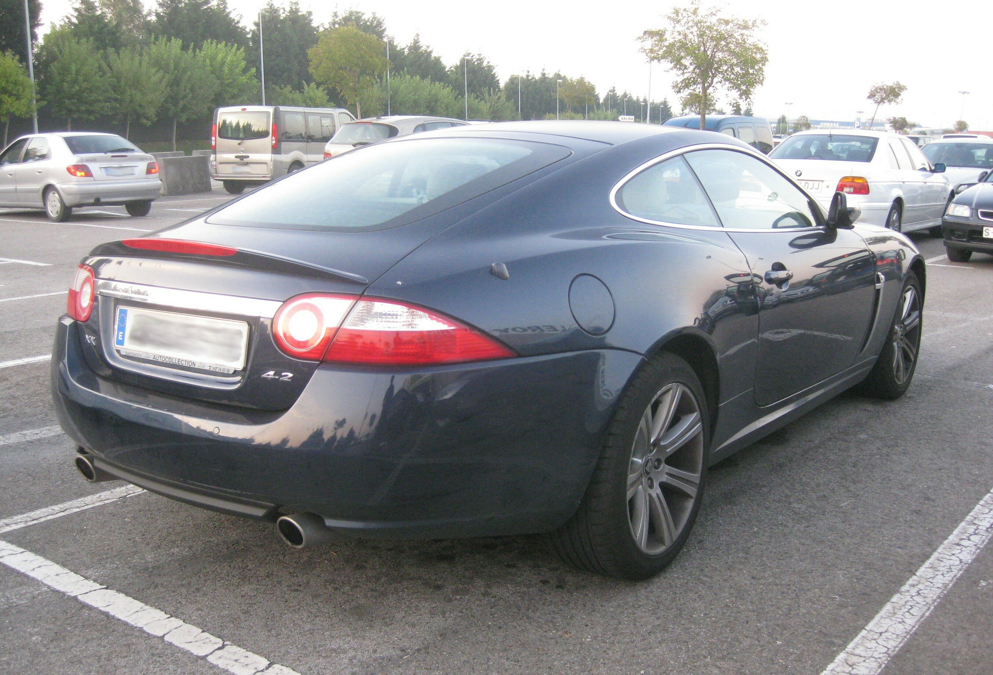 Spotted in Santander (Cantabria).